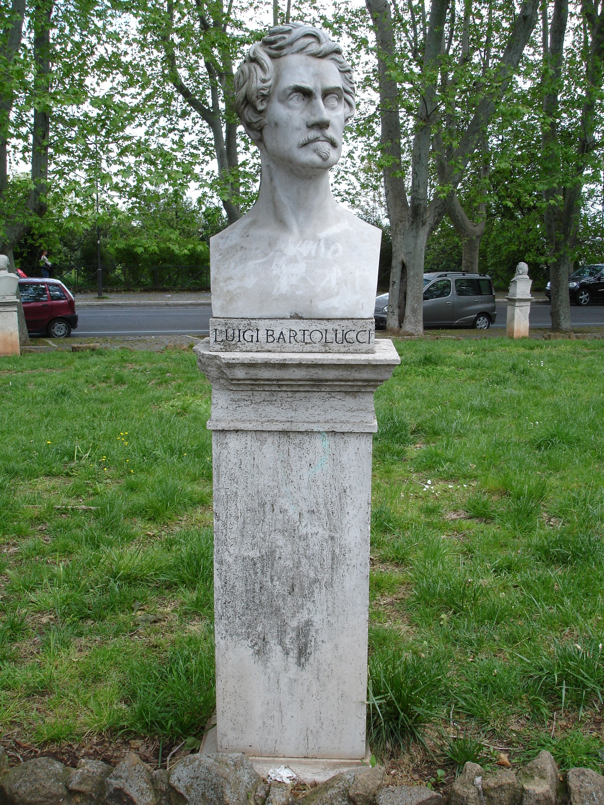 Busto del generale Luigi Bartolucci (Cantiano, 1788 - Nizza, 1859) sul Gianicolo, a Roma. Foto scattata da F. Fullone. Original uploader was Fullo88 at it.wikipedia.